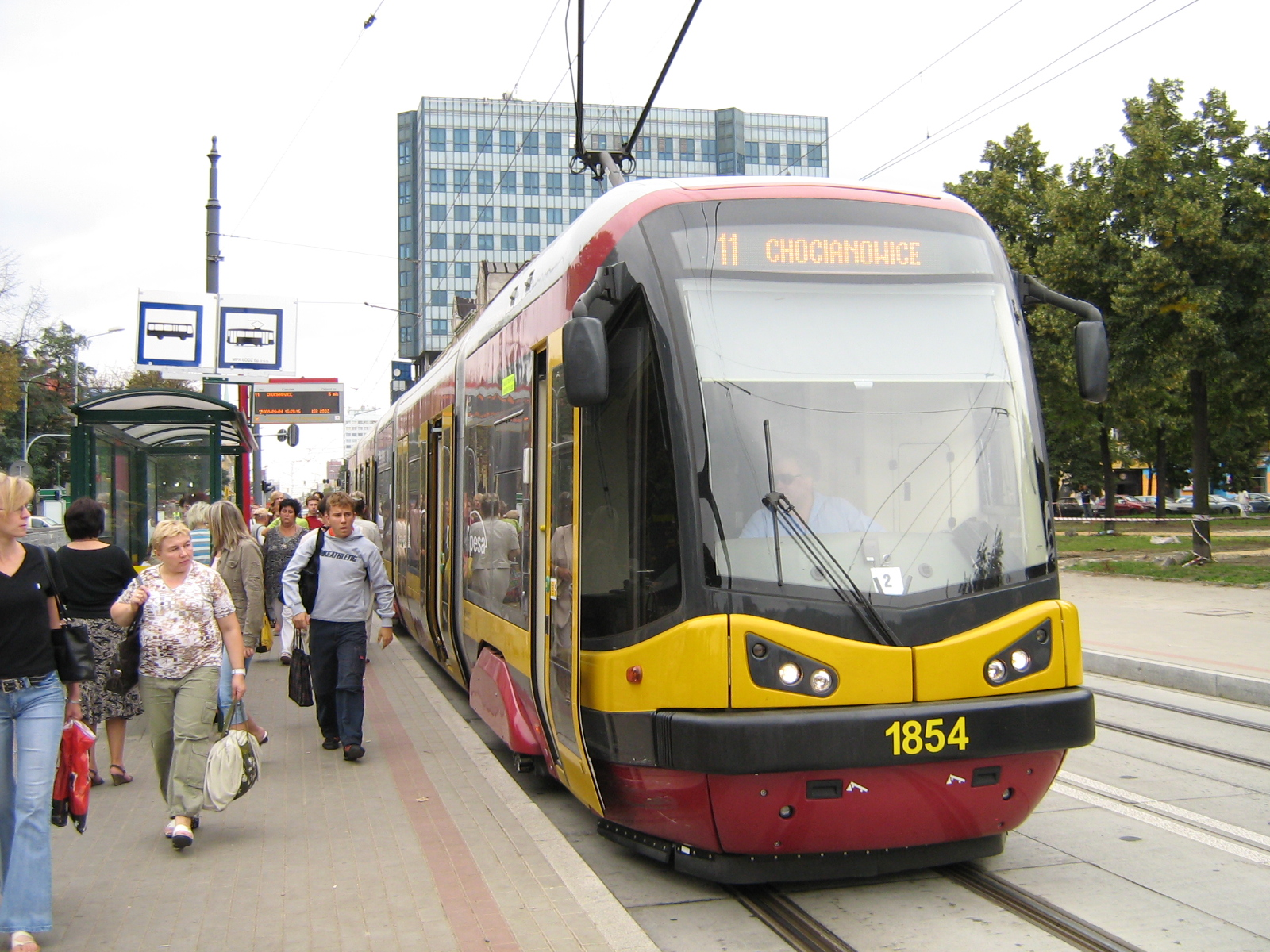 Tramwaj PESA 122N w Łodzi.